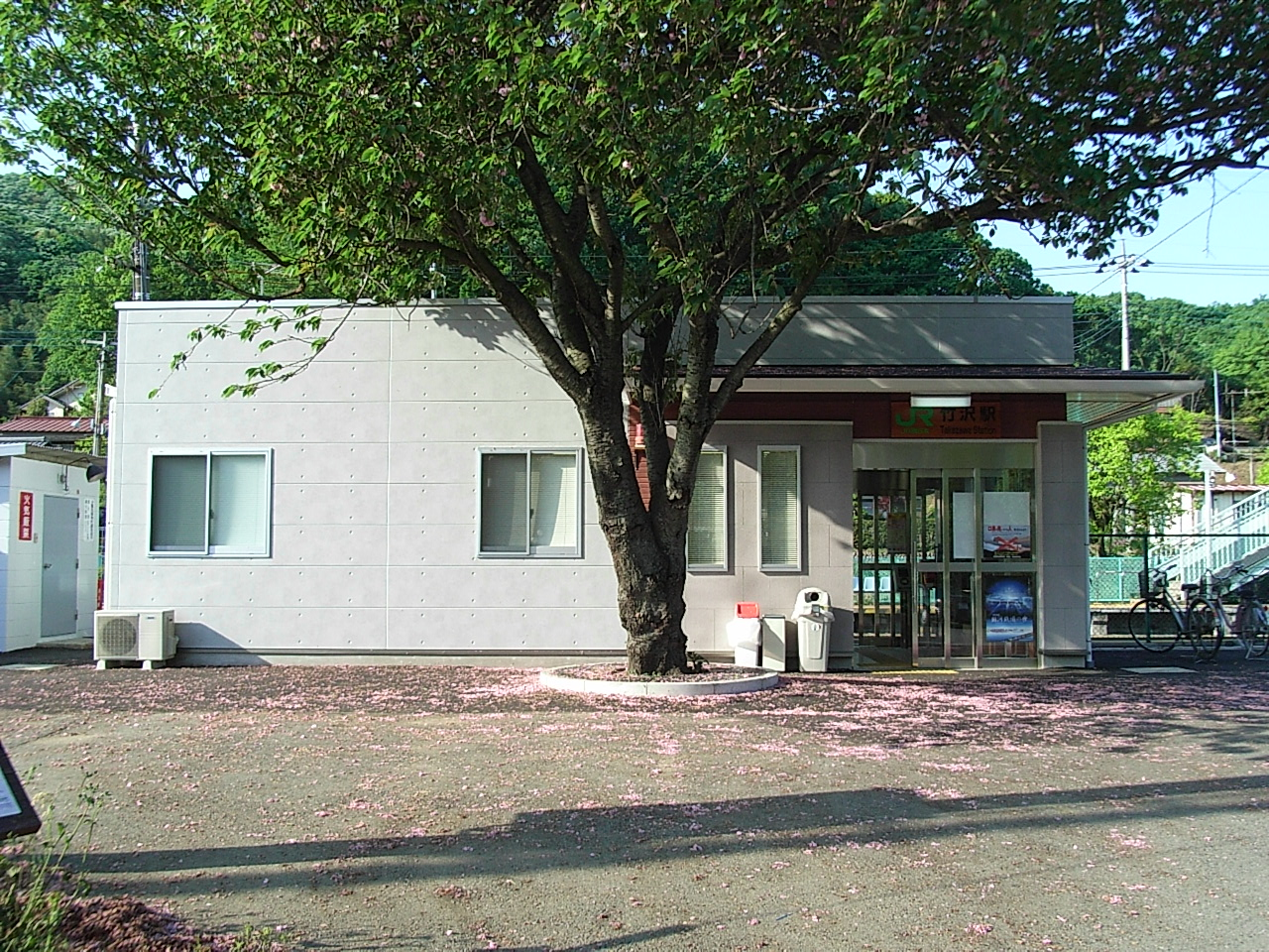 Takezawa Station